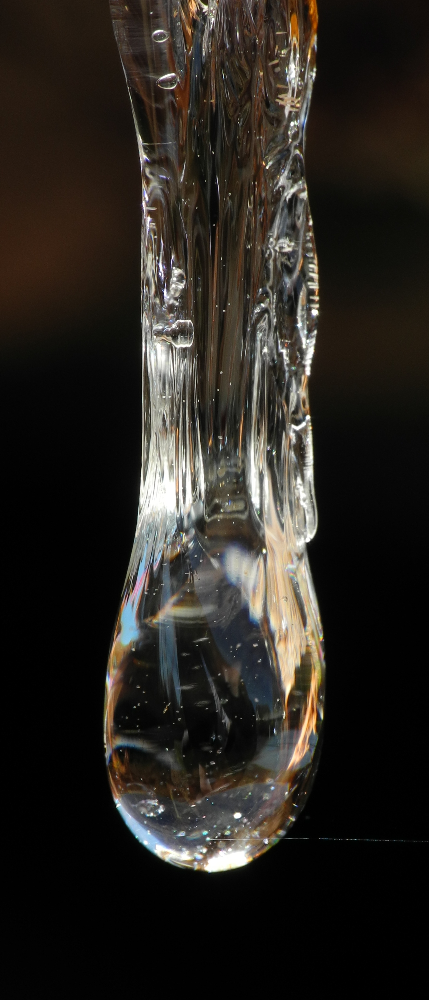 Résine coulant d'un arbre récemment coupé. Image prise avec la bonnette Raynox DCR-250.